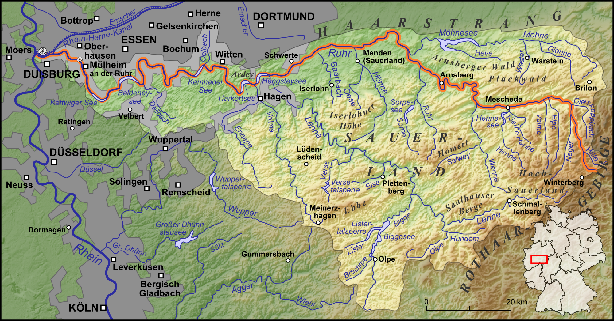 Die Ruhr und ihre Nebenflüsse